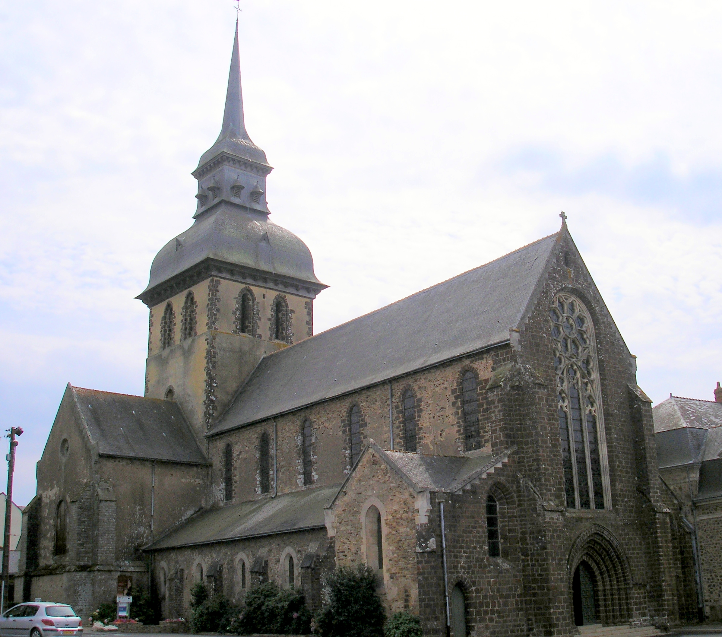 Saint-Gildas-des-Bois (Pays-de-Loire, France). L'église abbatiale.